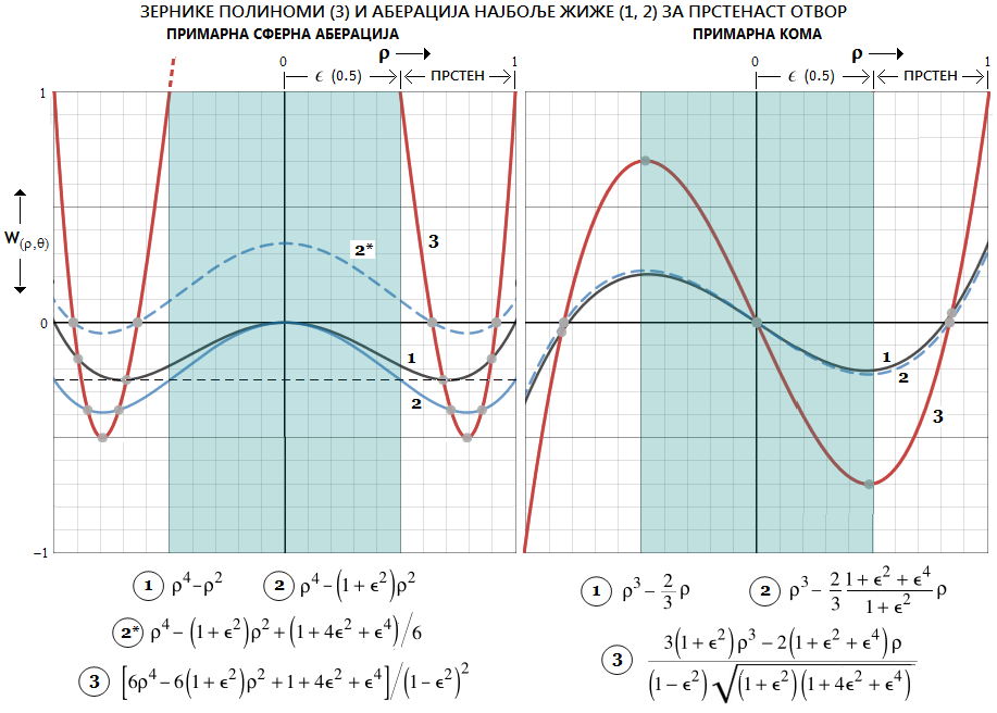 Српски (ћирилица): ЗЕРНИКЕ АБЕРАЦИЈЕ И АБЕРАЦИЈЕ НАЈБОЉЕ ЖИЖЕ ЗА ПРСТЕНАСТ ОПТИЧКИ ОТВОР, ПРИМЕР